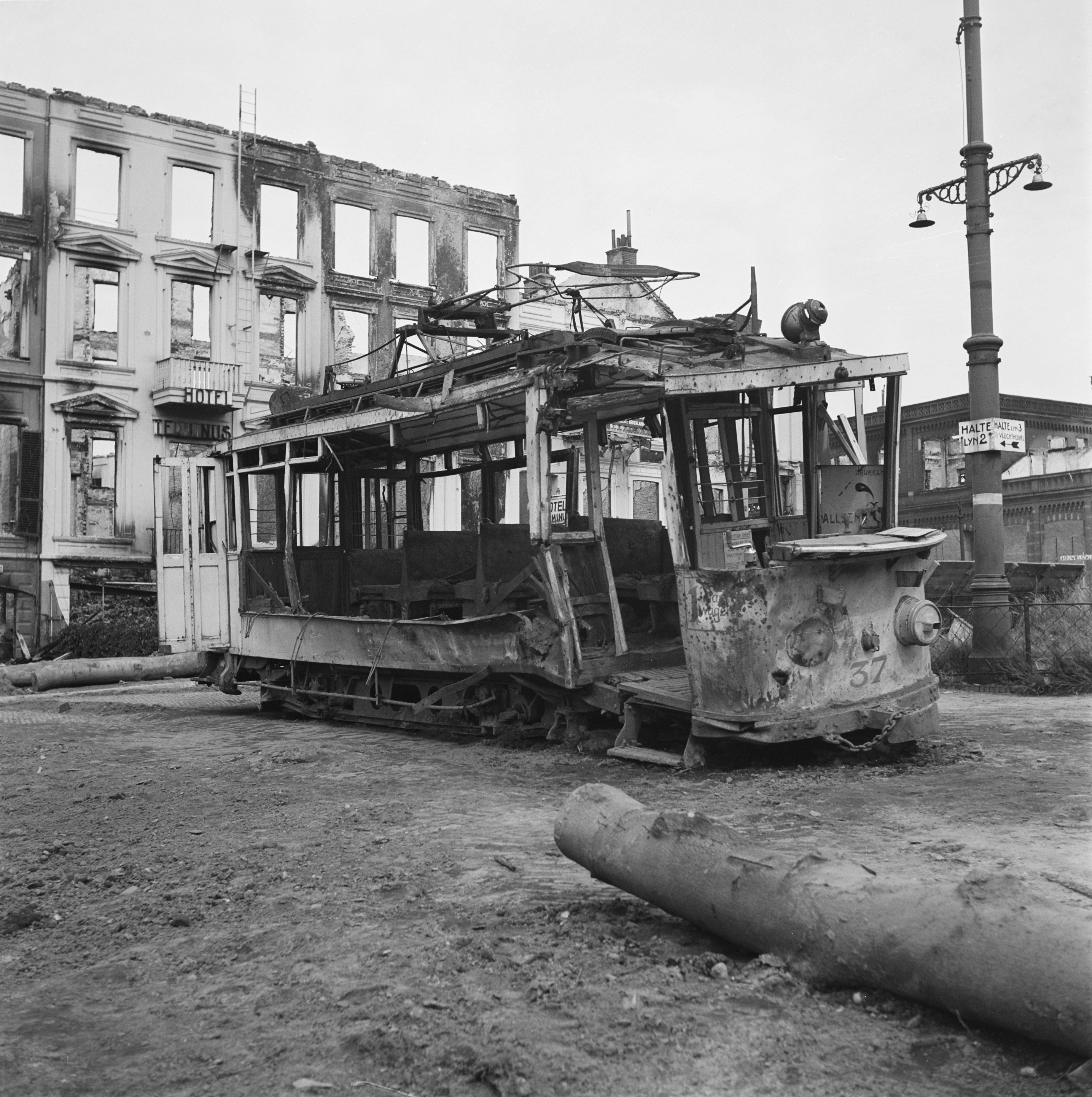 Collectie / Archief : Fotocollectie Anefo Reportage / Serie : Vernielingen: Arnhem Beschrijving : [uitgebrande tram op Stationsplein] Datum : juni 1945 Locatie : Arnhem Trefwoorden : trams, tweede wereldoorlog, vernielingen Fotograaf : Presser, Sem / Anefo, [onbekend] Auteursrechthebbende : Nationaal Archief Materiaalsoort : Negatief (zwart/wit) Nummer archiefinventaris : bekijk toegang 2.24.01.03 Bestanddeelnummer : 900-4368